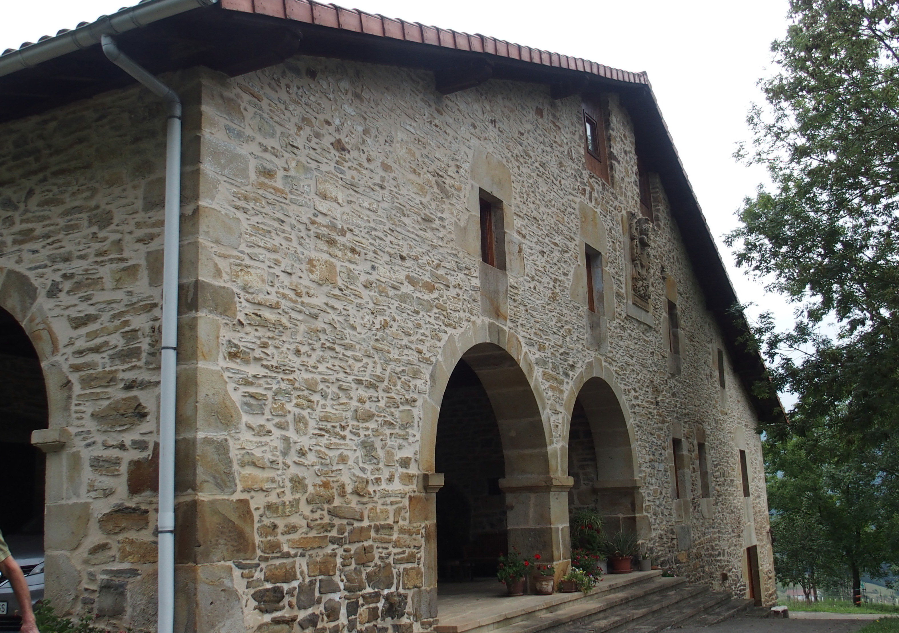 Eguren baserria (Bergara) Irudi hau Wikibizi kanpainaren baitan igo da, Euskal Wikilarien Kultura Elkarteak 2020an deitutako argazki lehiaketa hirukoitza. Helburua, Euskal Herria hobeto ezagutzen laguntzea da.Lagundu zuk ere irudi hau dagokion artikuluetan txertatzen.